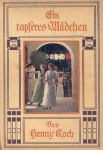 Buchcover des Werkes "Ein tapferes Mädchen" von Henny Koch